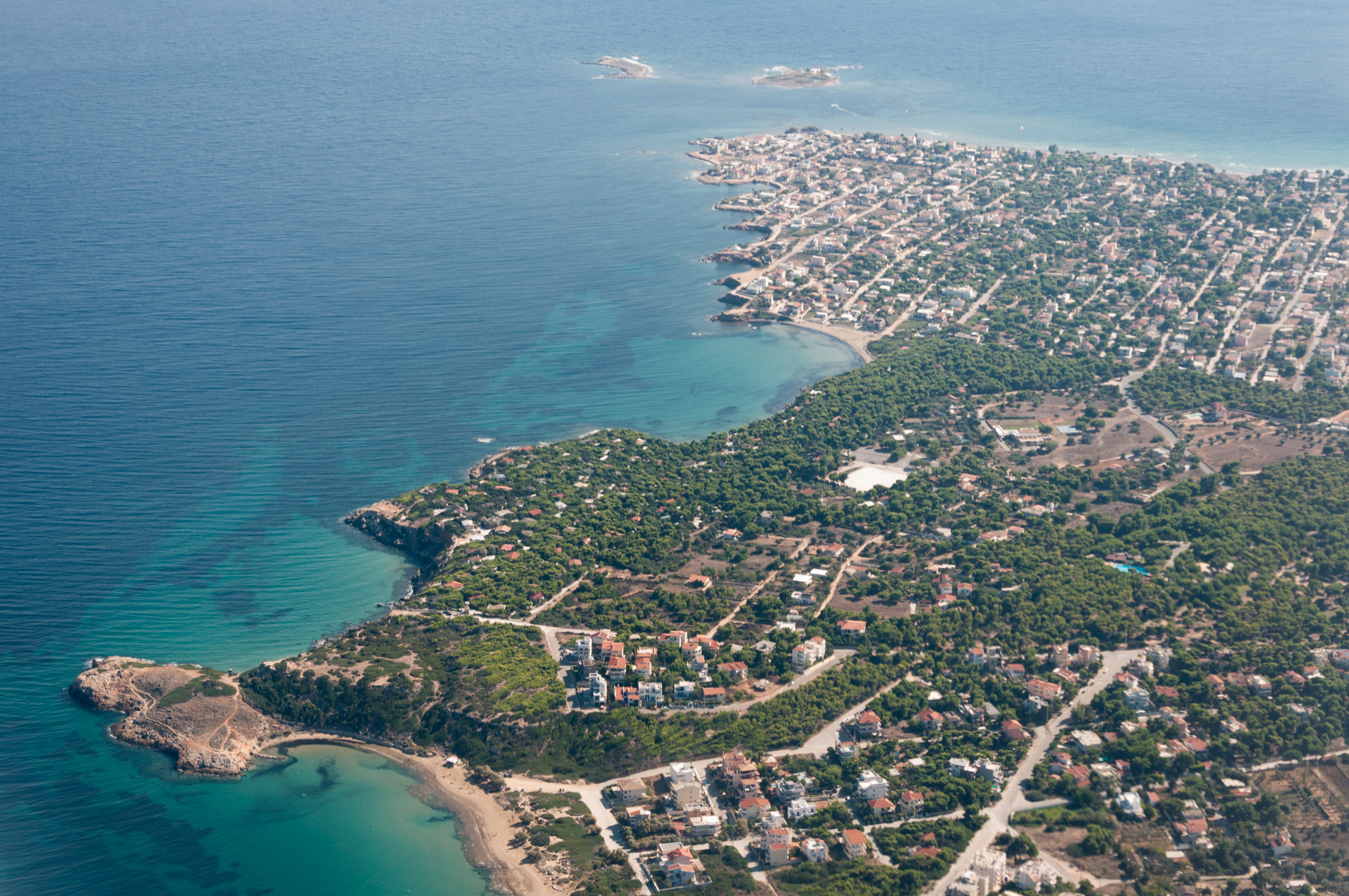 Greece, Agios Nikolaos